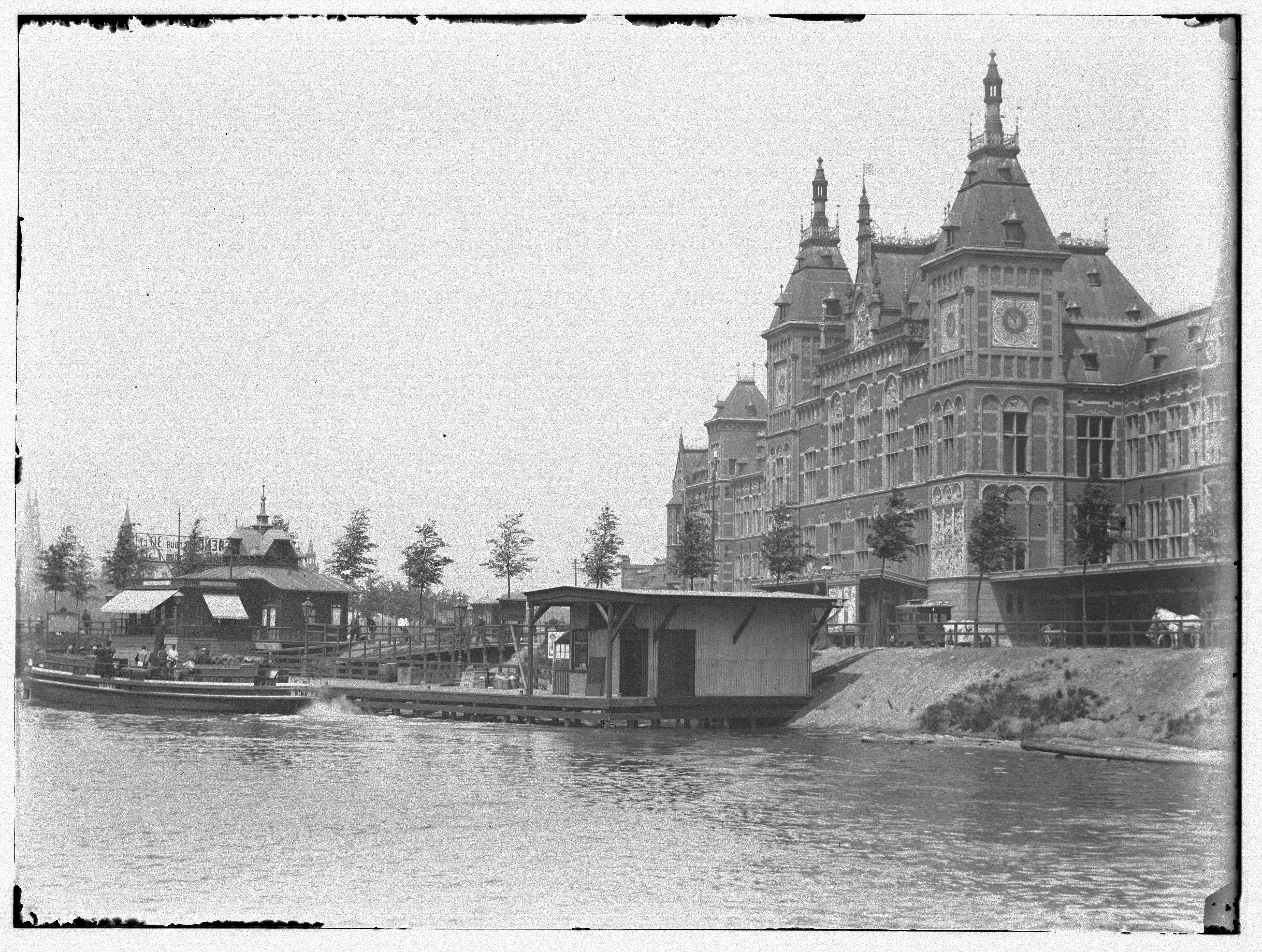 Beschrijving Open Havenfront Gezien naar Noord-Hollands Koffiehuis``, steiger NH-tram en Centraal Station. Documenttype foto Vervaardiger Olie``, Jacob (1834-1905) Collectie Collectie Jacob Olie Jbz. Datering 19 juni 1896 Geografische naam Open Havenfront Inventarissen Afbeeldingsbestand 010019000883 Generated with Dememorixer